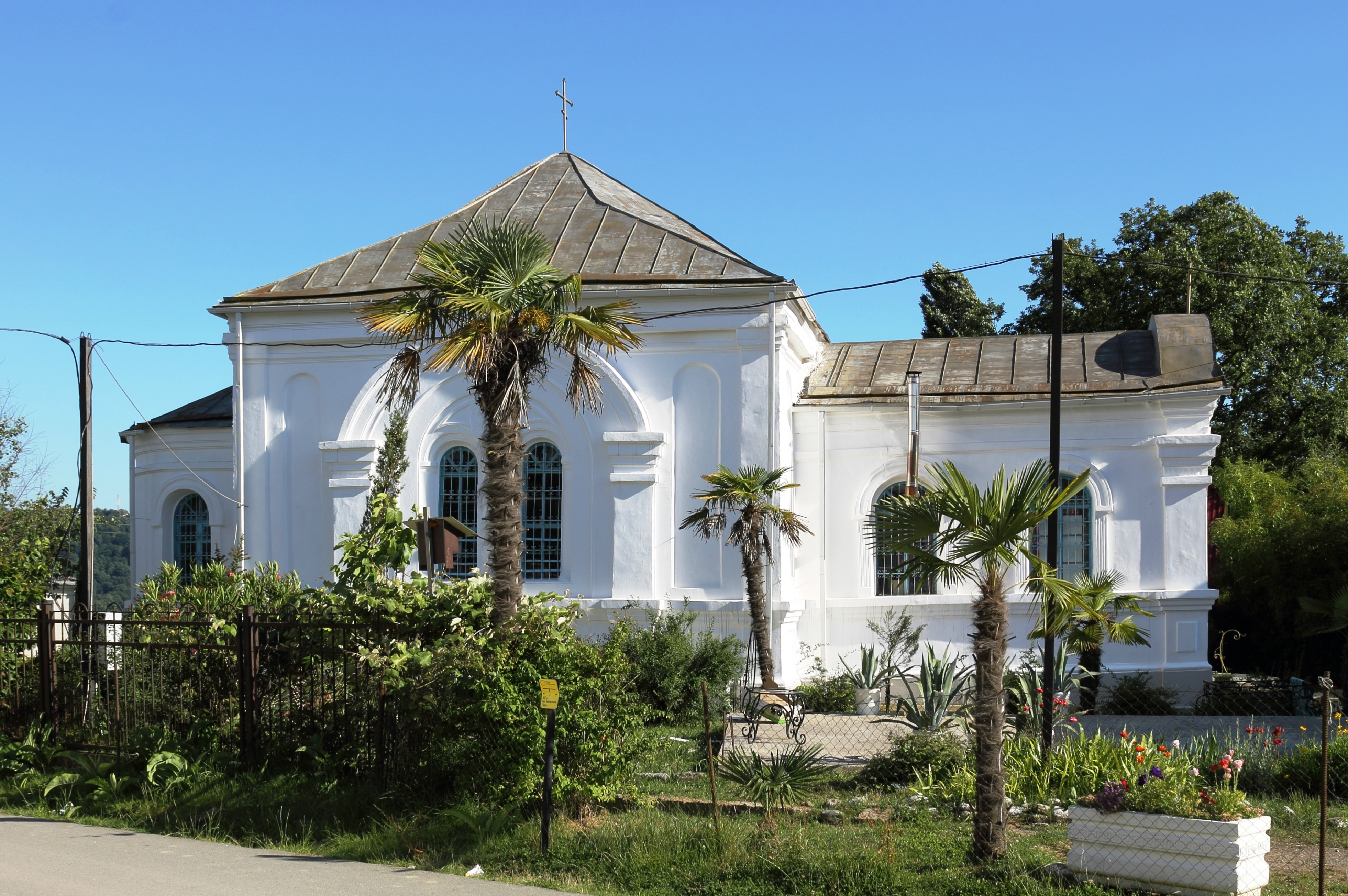 Храм Успения Пресвятой Богородицы в селе Высокое Адлерского района города Сочи